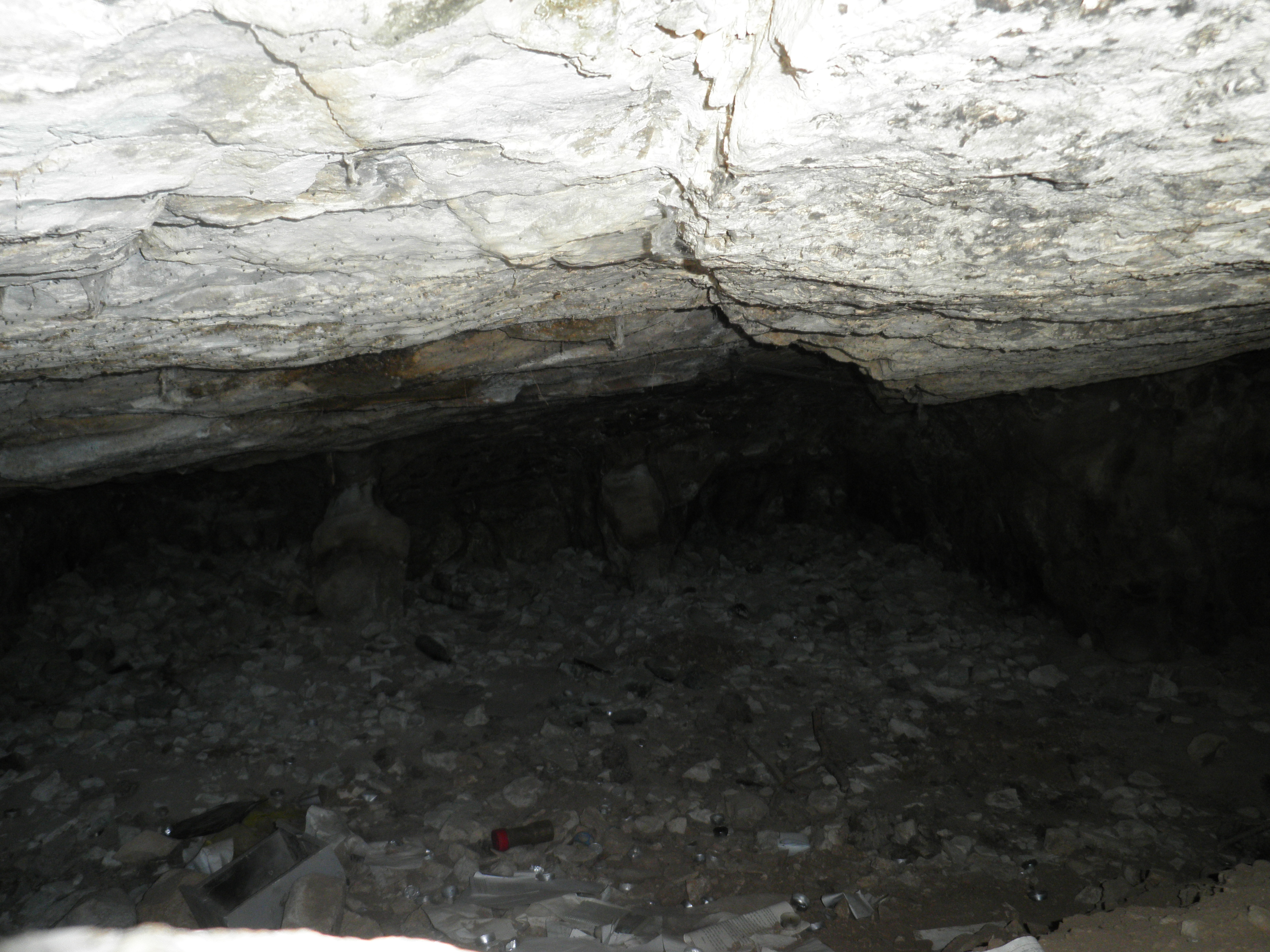 מערת רב פפא